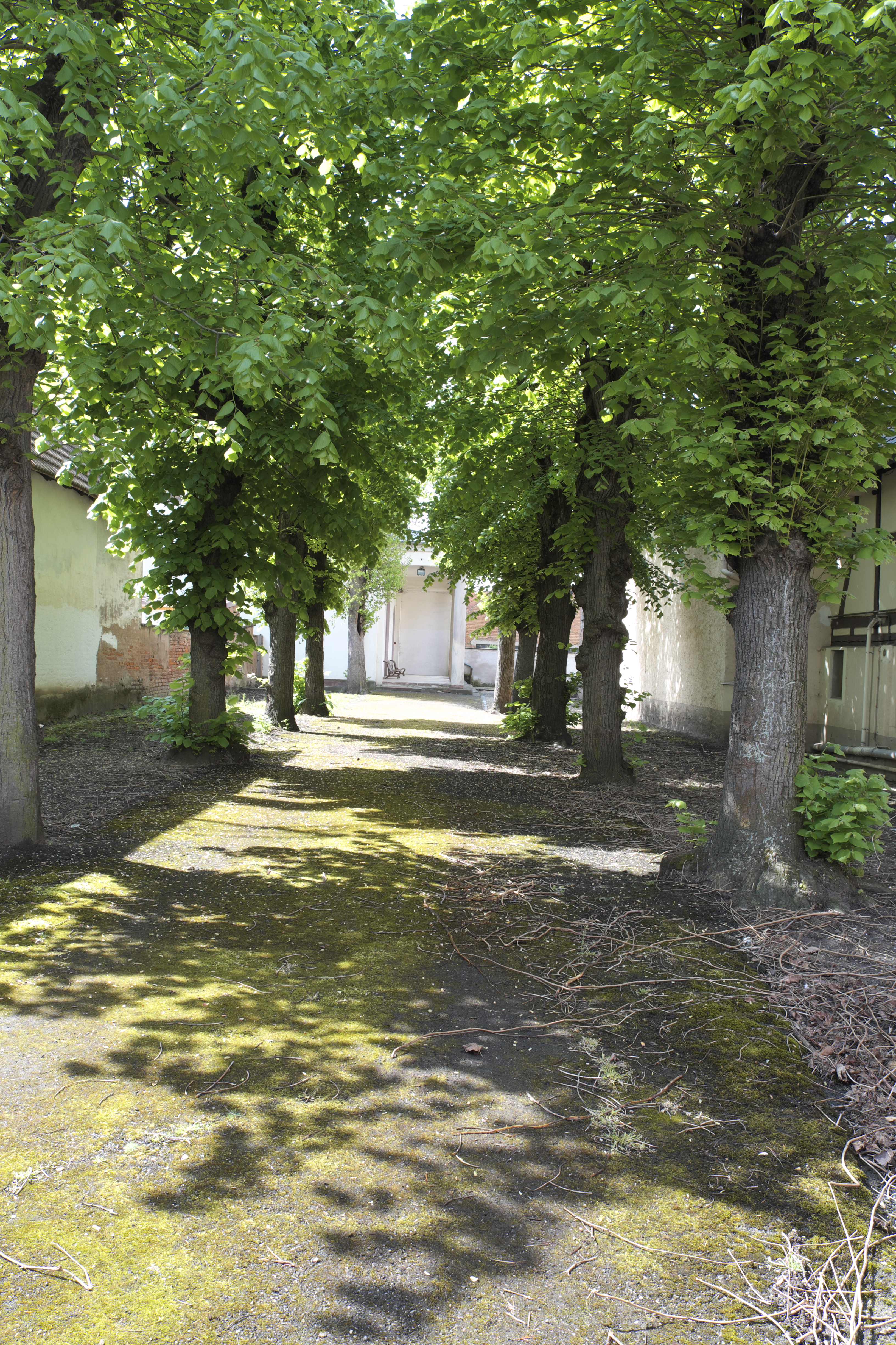 Synagoge in Brumath im Département Bas-Rhin (Elsass/Frankreich), Zugang